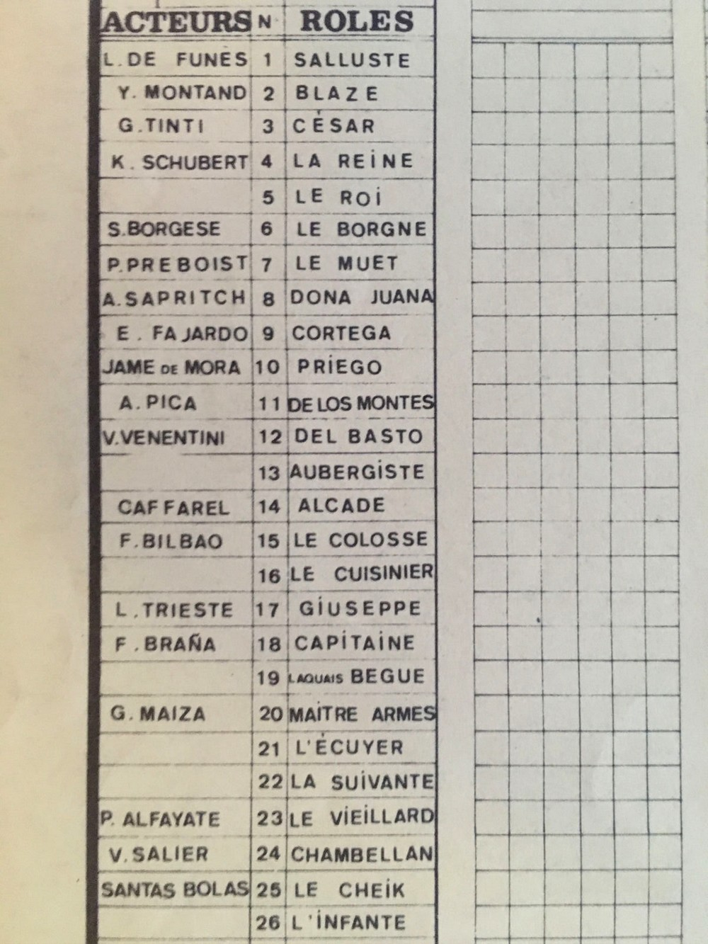 Partie du planning du tournage du film La Folie des grandeurs (1971), montrant les membres de la distribution.